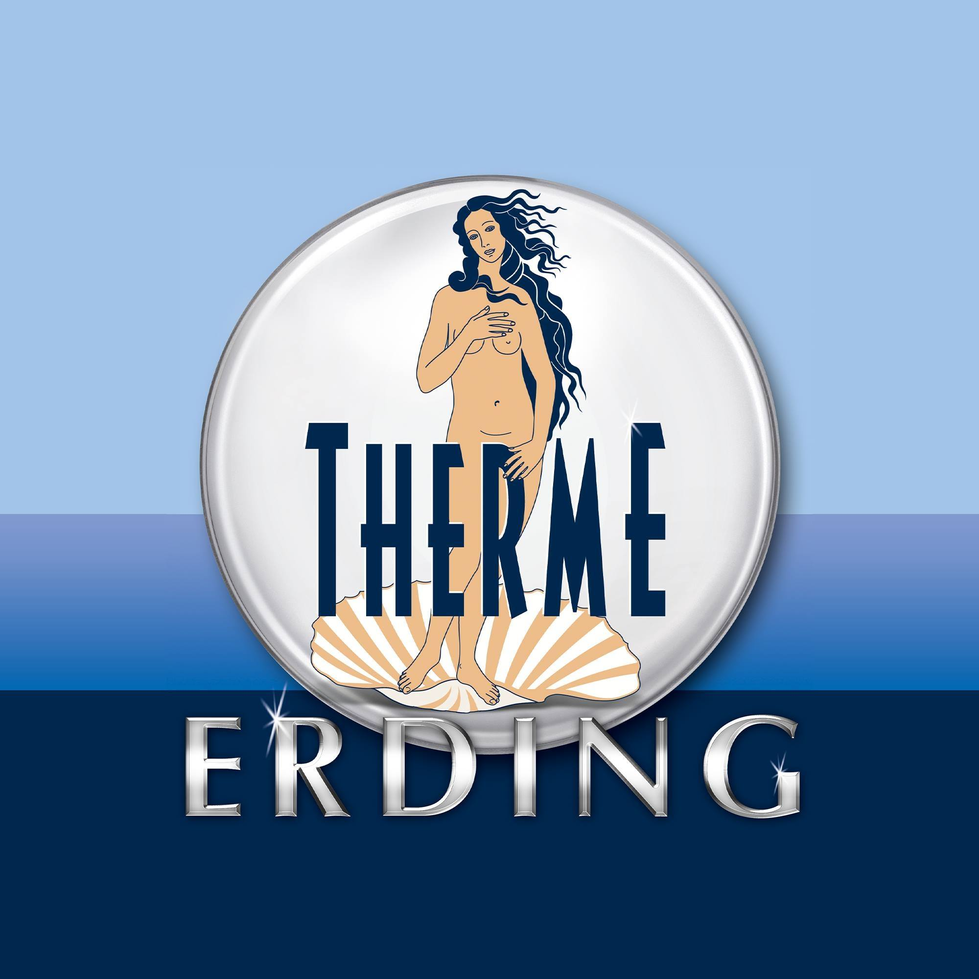 Logo Therme Erding